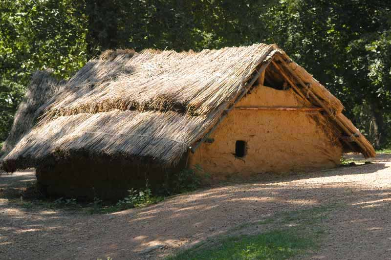 Sloupový dům rekonstruovaný v Zoo